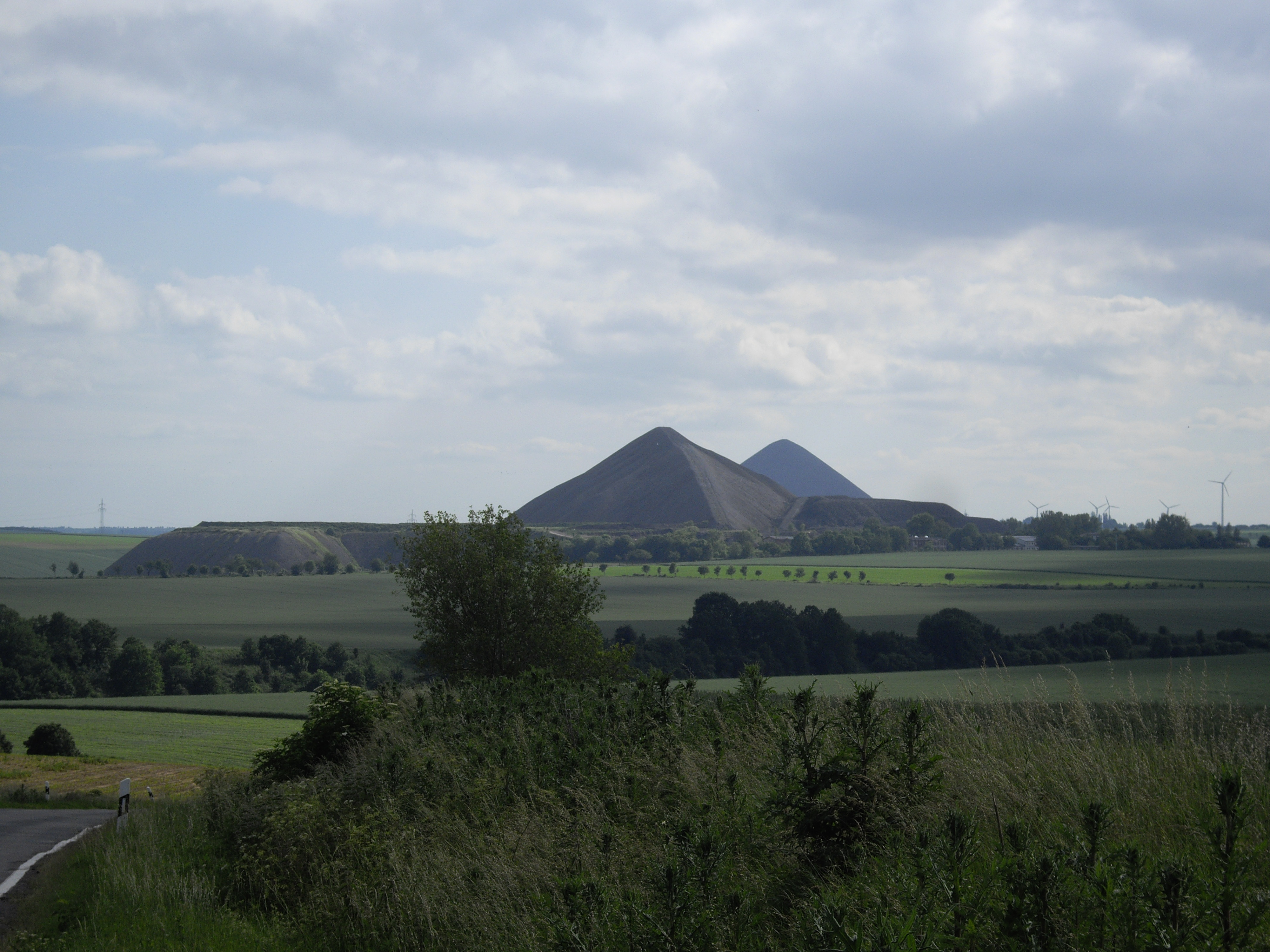 Blick von einer Anhöhe südlich von Gerbstedt auf die Halden des Otto-Brosowski-Schachtes im Vordergrund und des Ernst-Thälmann-Schachtes im Hintergrund